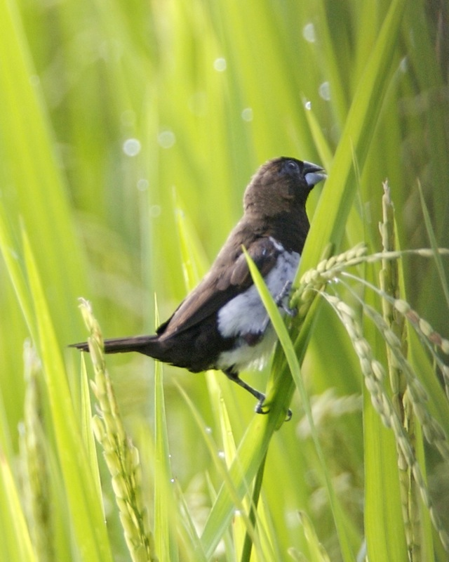 Javan Munia Lonchura leucogastroides aka Munia leucogastroïdes Ubud, Bali, Indonesia 690V3419